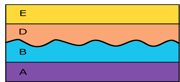 Una serie estratigráfica antigua, que fue sometida a un periodo erosivo y después vino una secuencia estratigráfica más joven que se superpuso sobre la más antigua.